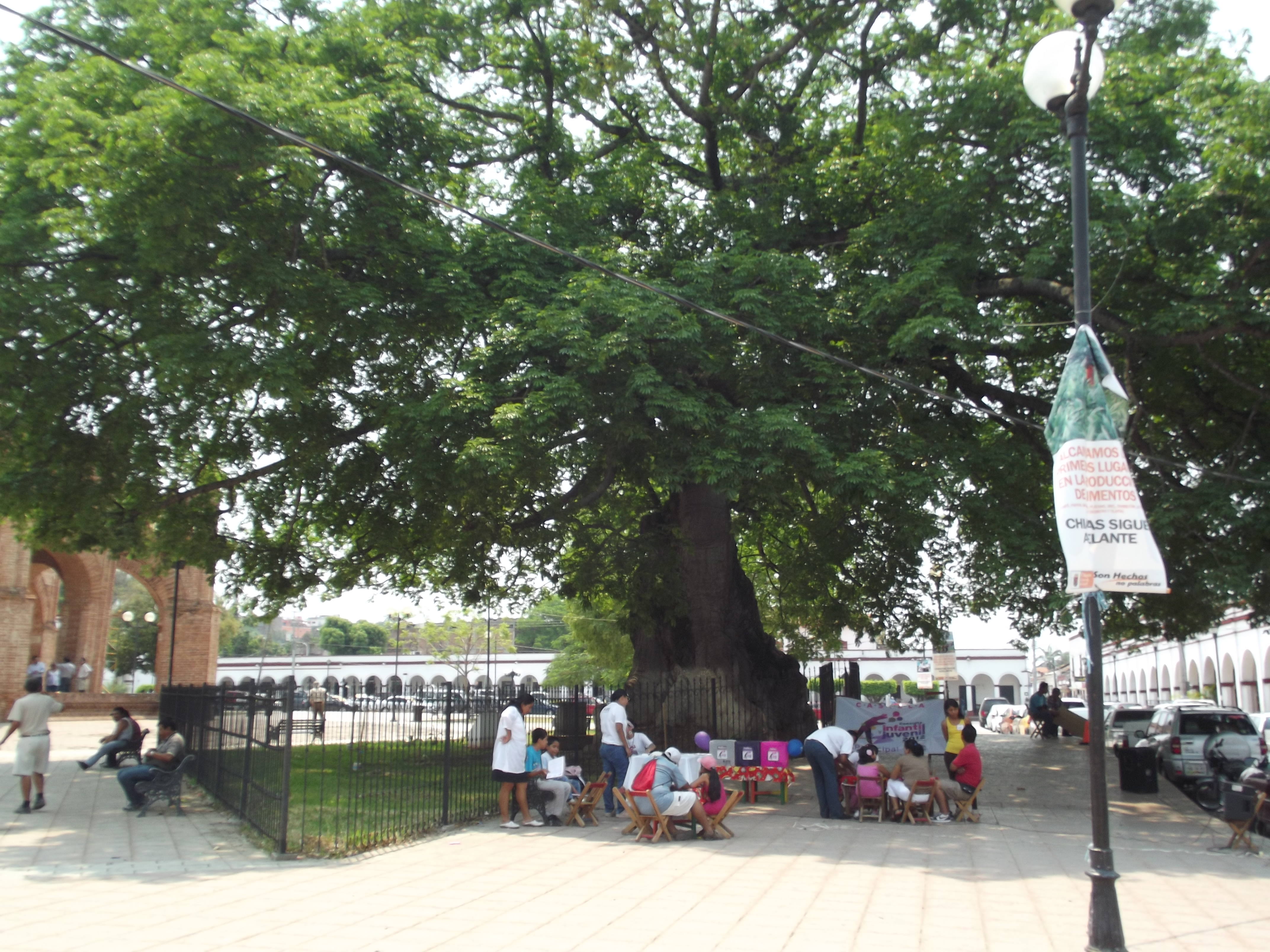 La Pochota o Ceiba (Pentandra). Arbol Historico.